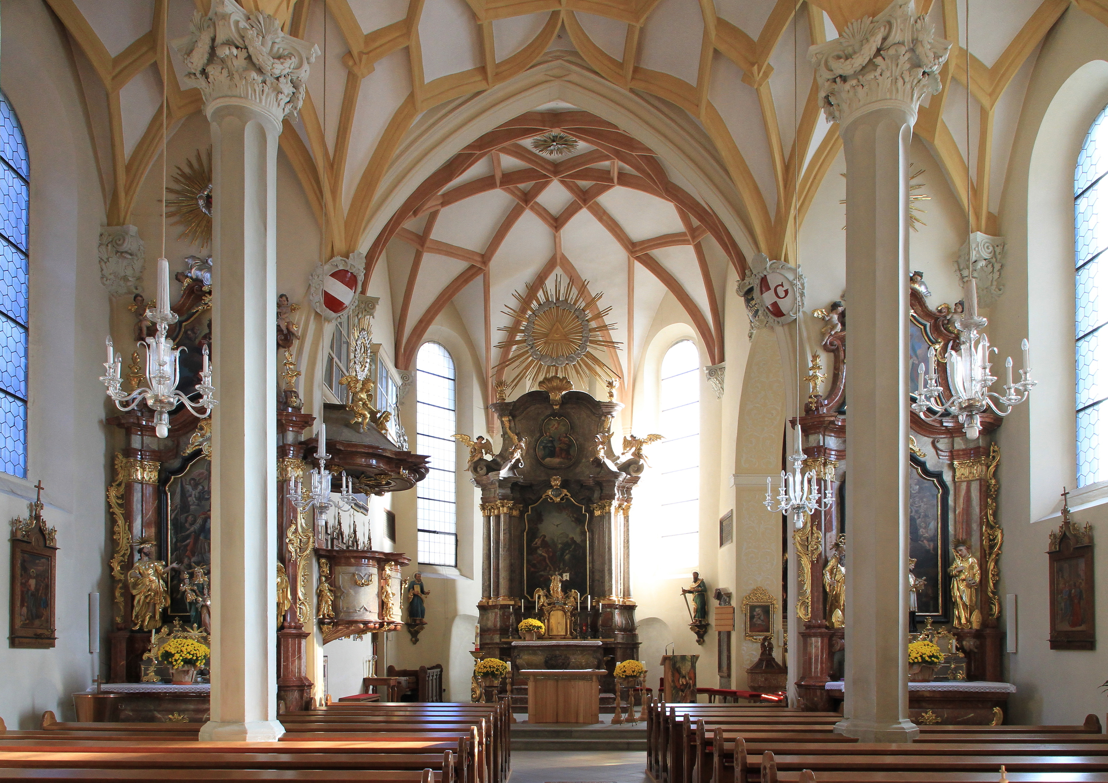 Blick Richtung Hochaltar in der niederösterreichische Gaminger Pfarrkirche hll. Philipp und Jakob.